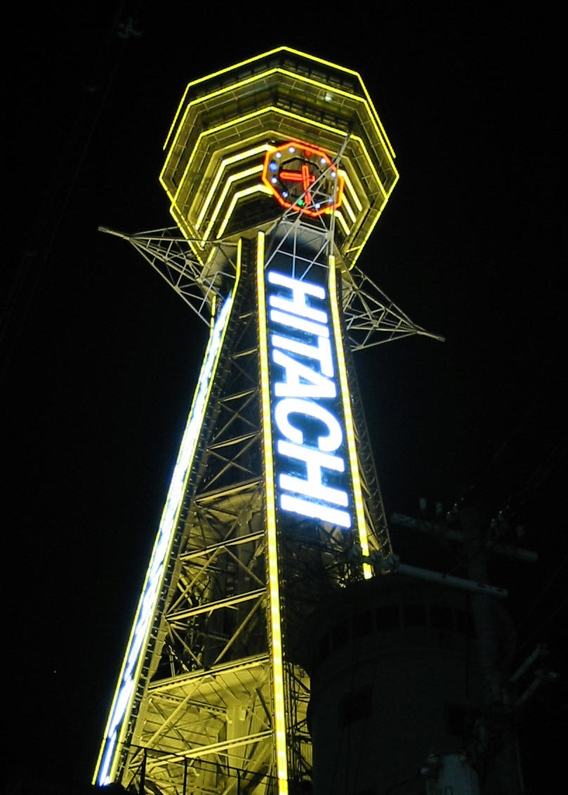 Tsutenkaku tower (Night view)